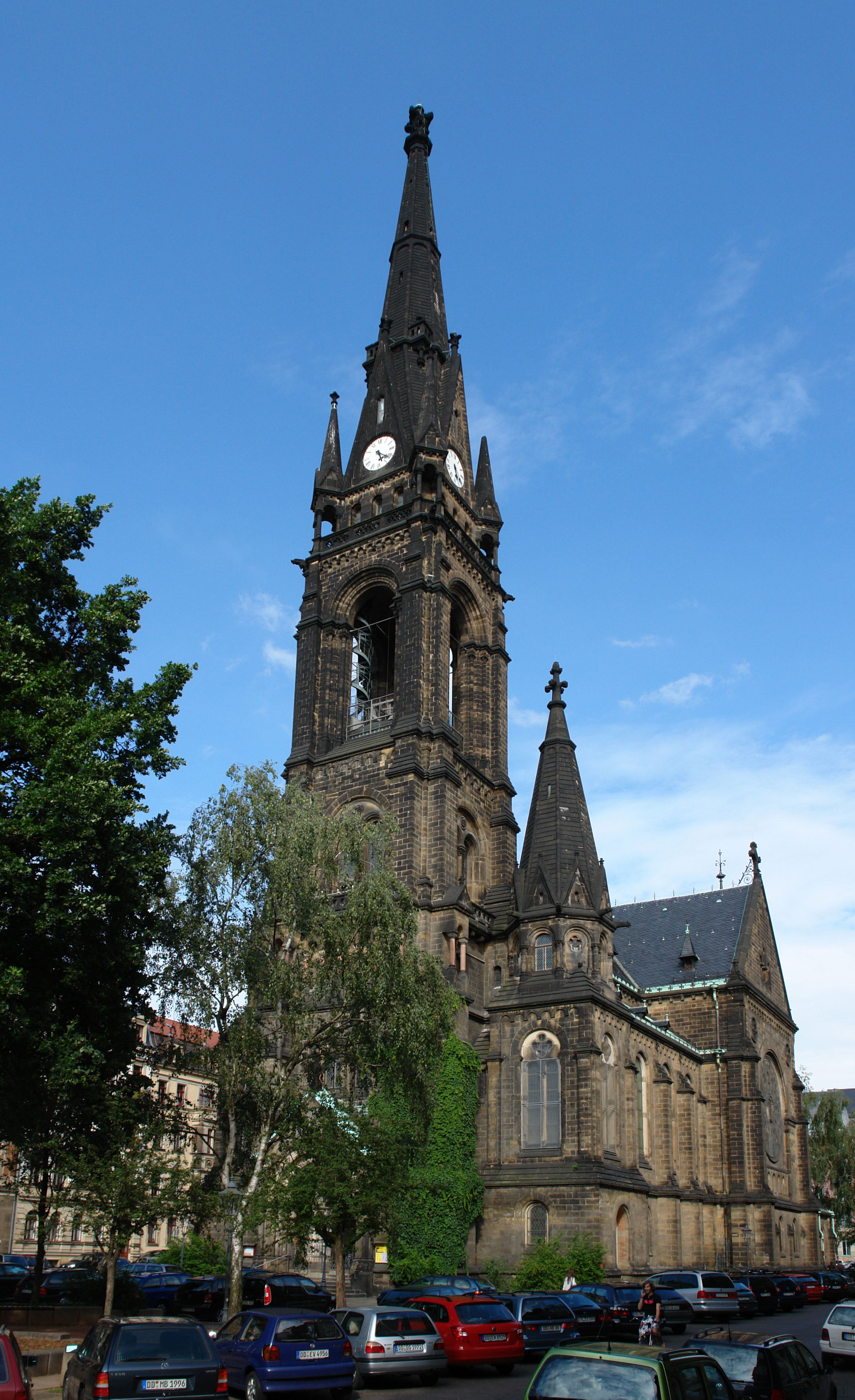 Martin-Luther-Kirche in Dresden-Neustadt von der Martin-Luther-Straße (von Westen)